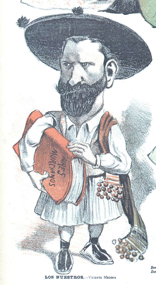 Caricatura.